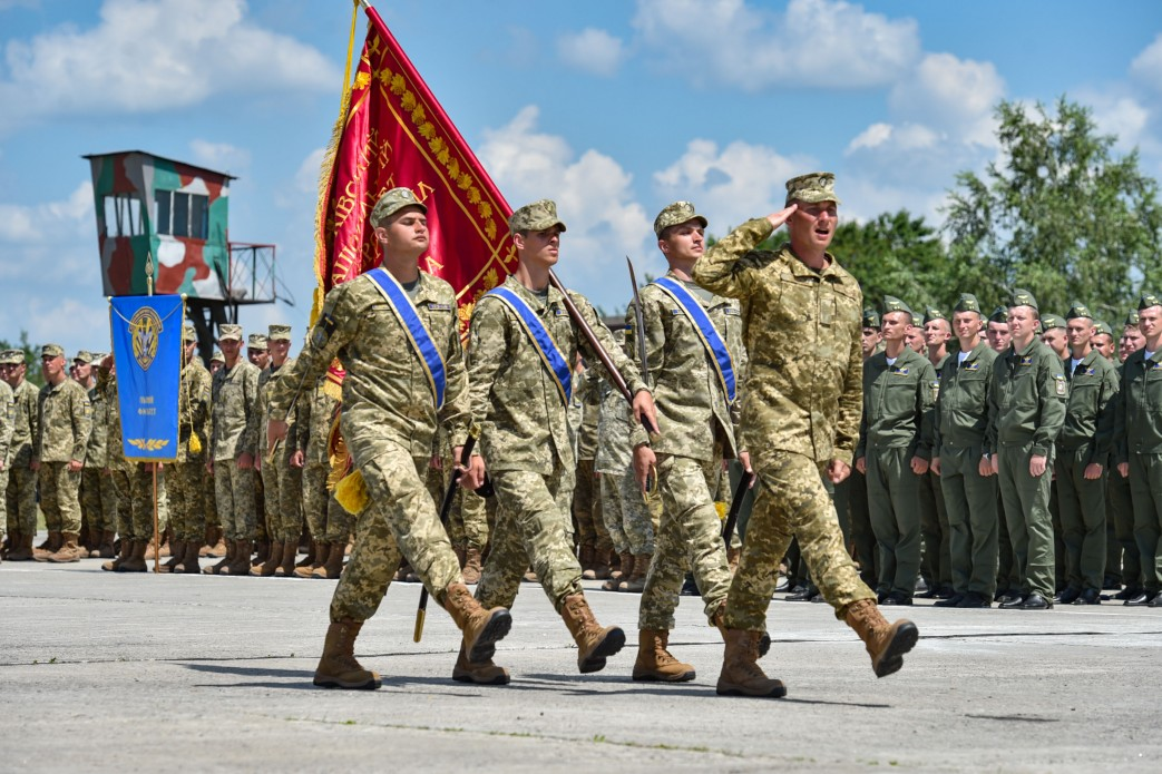 Робоча поїздка до Харківської області.